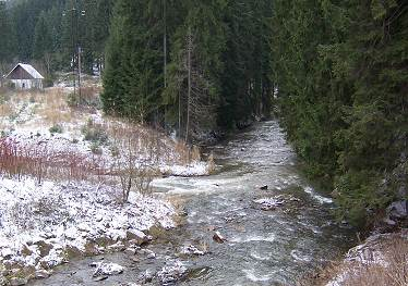 Vznik řeky Ostravice na soutoku Bílé a Černé Ostravice v Moravskoslezských Beskydech.